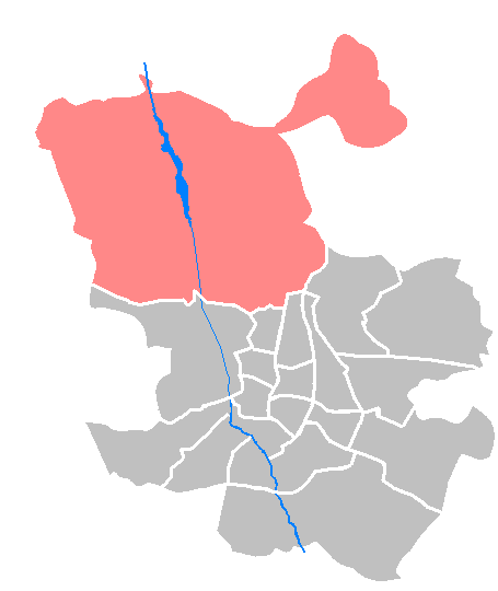 Locator maps of districts in Madrid: Maps - ES - Madrid - Fuencarral-El Pardo.PNG